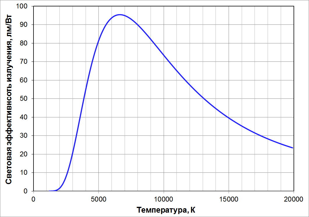 Температурная зависимость световой эффективности излучения абсолютно чёрного телап